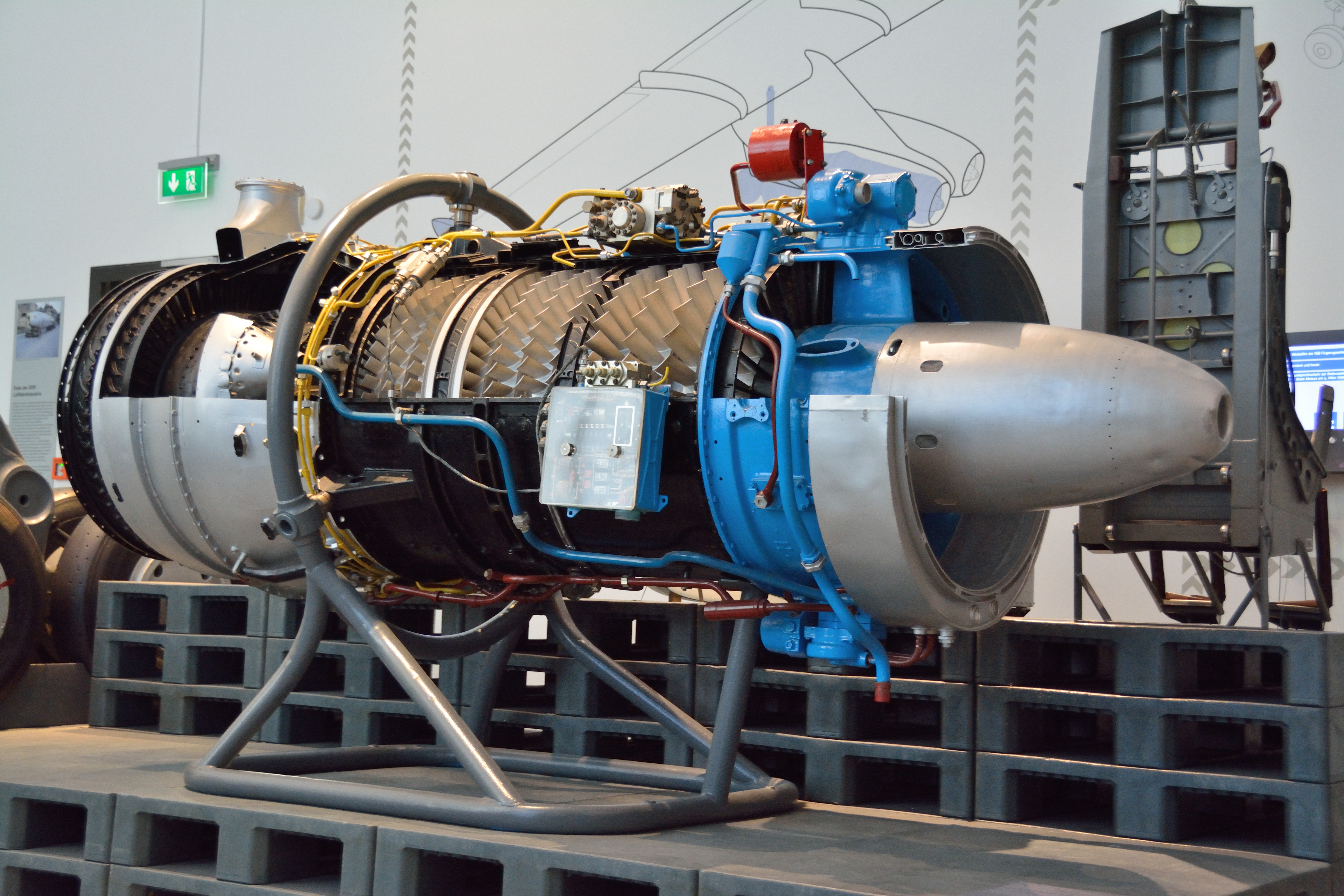 Strahltriebwerk Pirna 014 von 1958 im Verkehrsmuseum Dresden (Ausstellungsstand 2016)